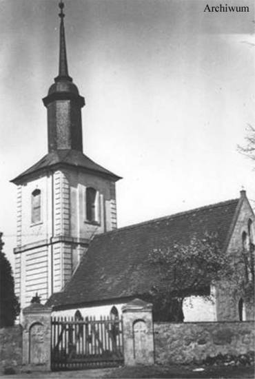 Church in Kołbaskowo, Poland